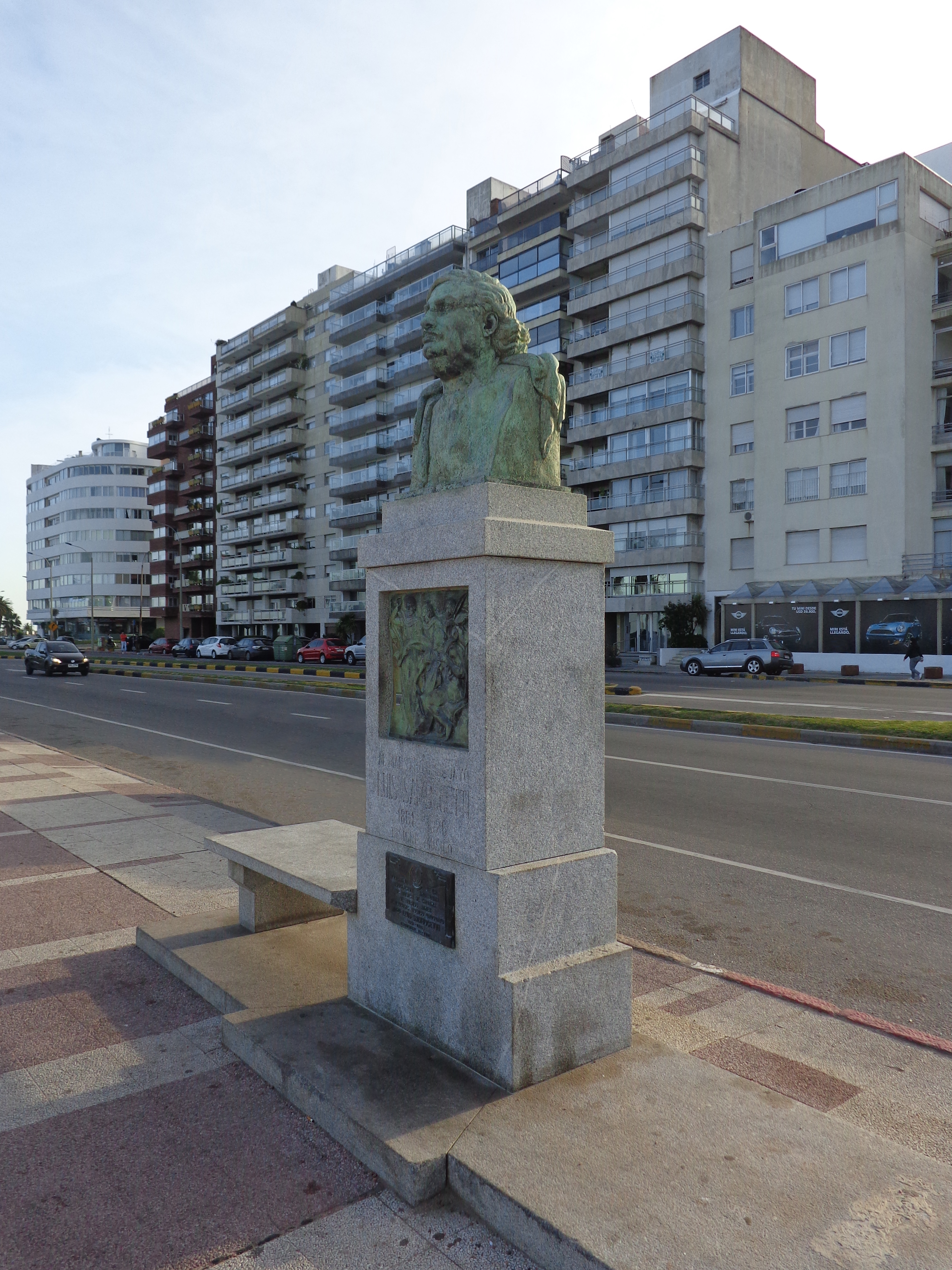 Luis Nicolás Sambucetti. Ubicada en el departamento de Montevideo